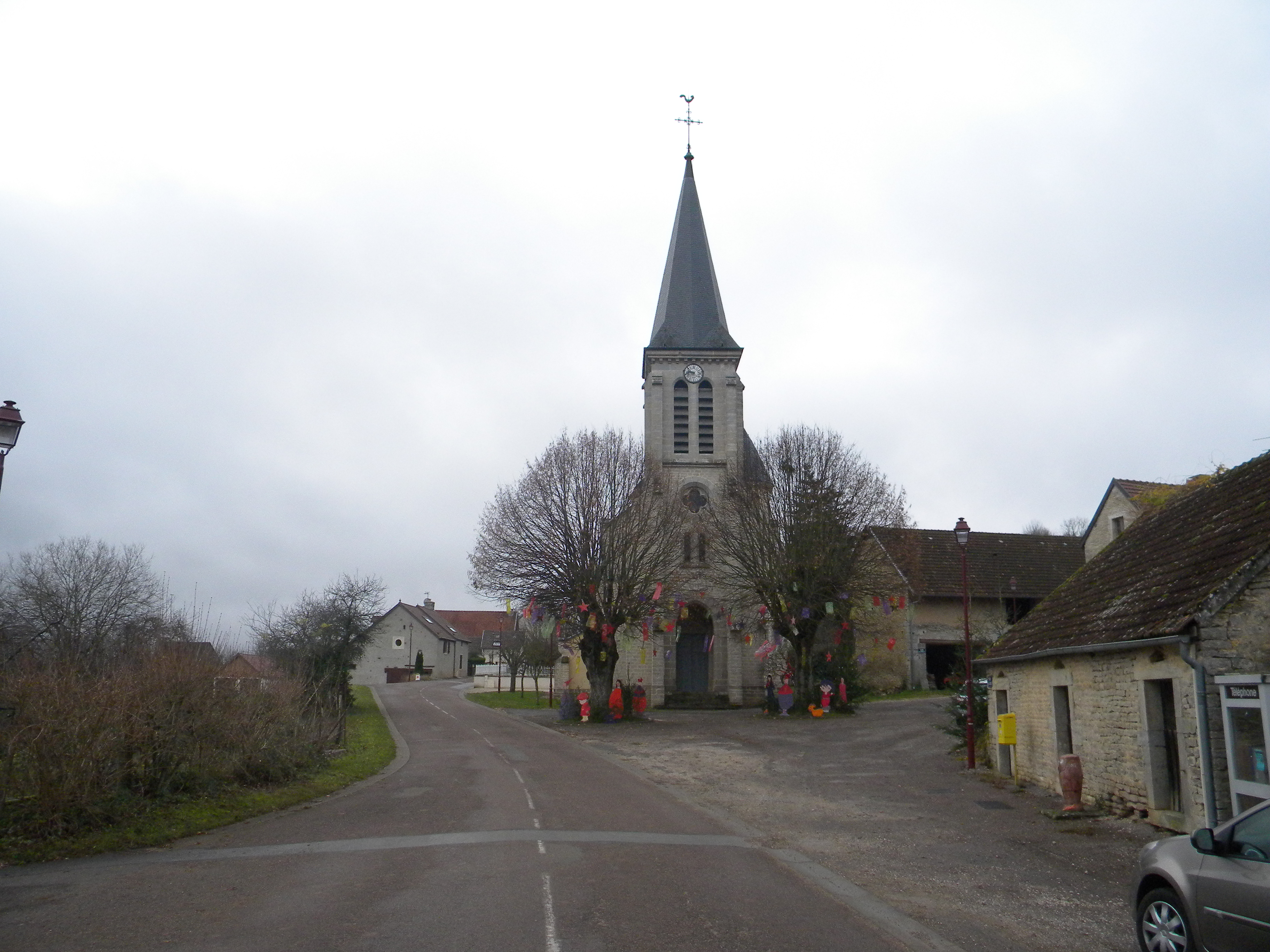 Preĝejo de Semezanges